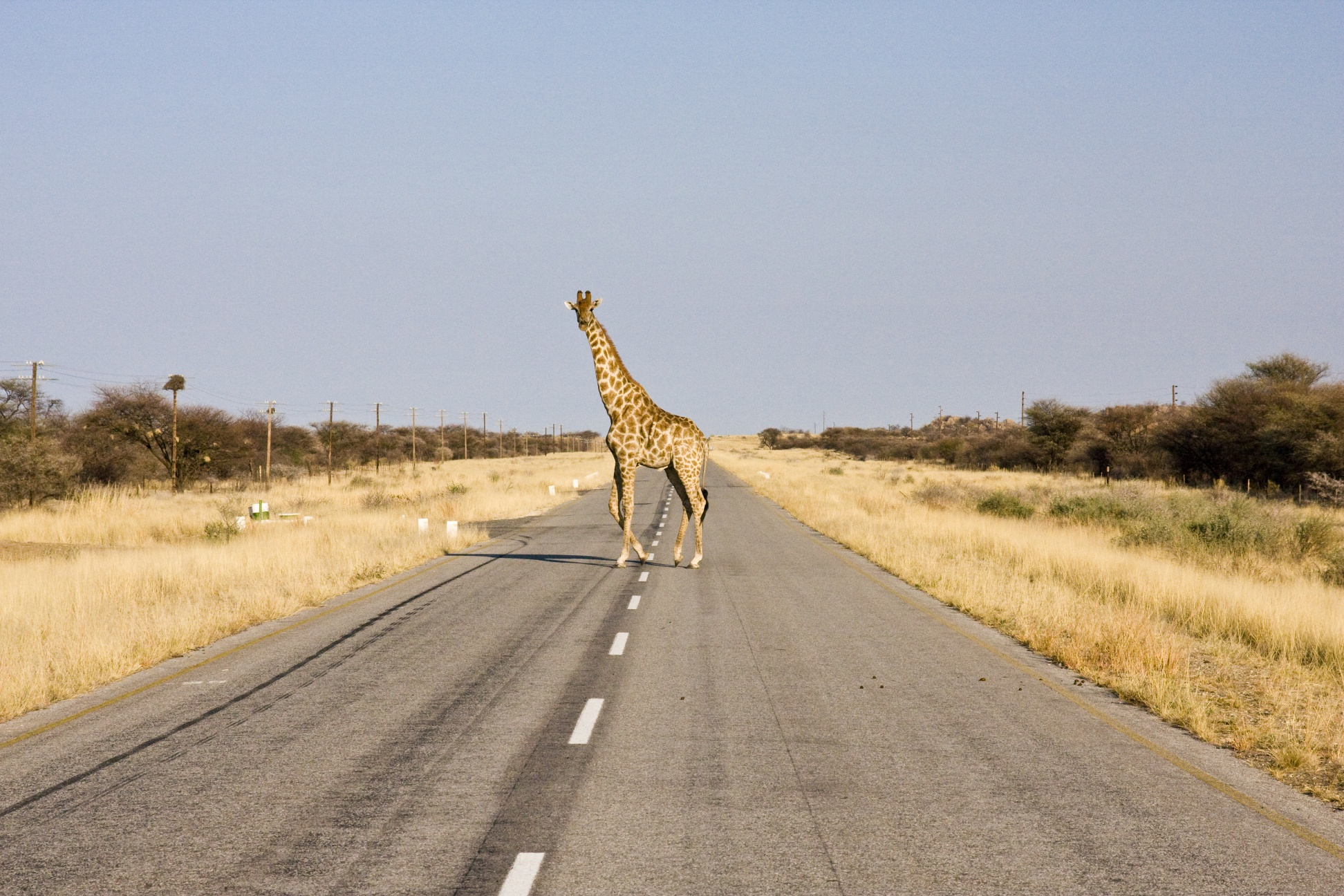 Etosha-Nationalpark, Namibia